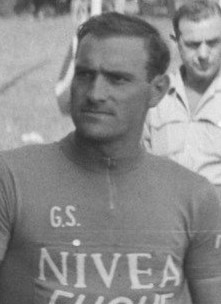 Start Ronde van Nederland Stadion Utrecht . Italiaanse ploeg (Nivea) kopman Fiorenzo Magni